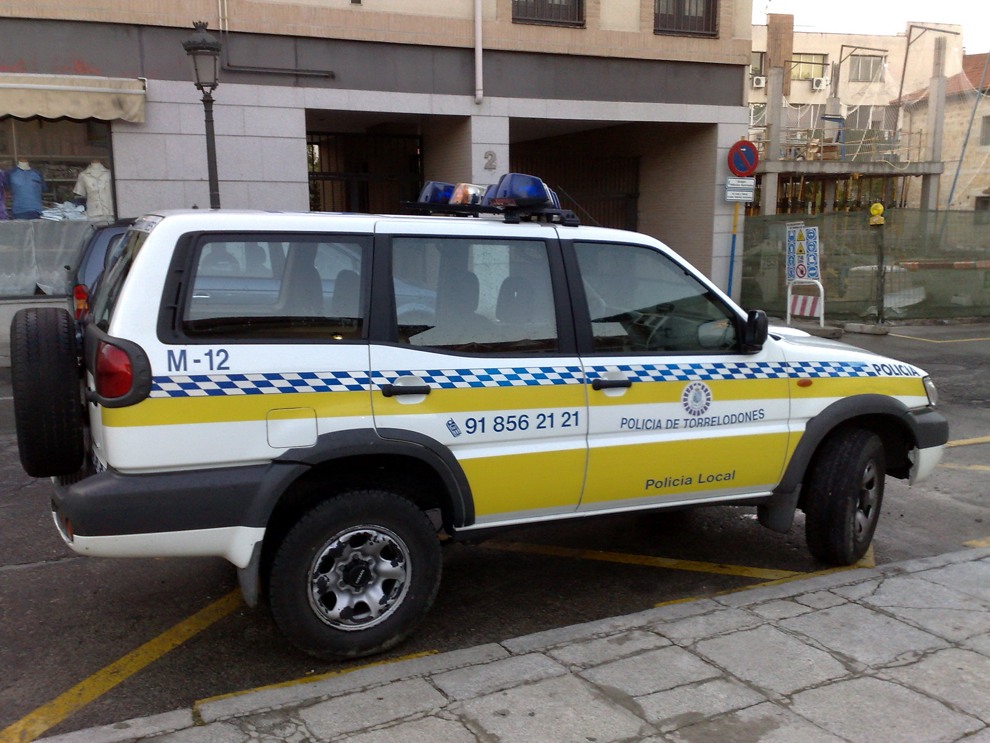 Torrelodones. Policía local. Vehículo patrulla.